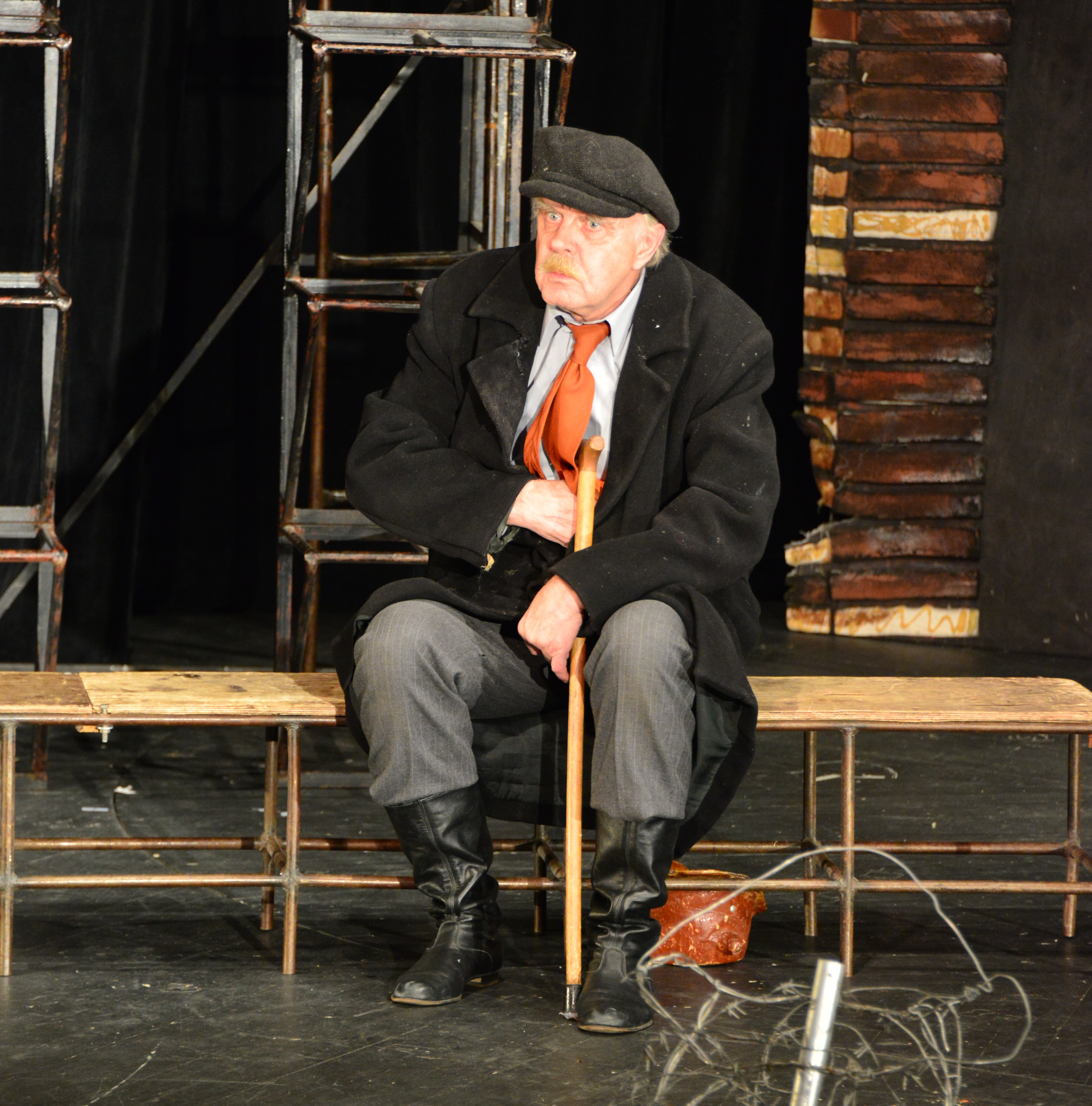 Спектакль «Роман о девочках» на сцене театра «У Никитских ворот» 08.10.2017